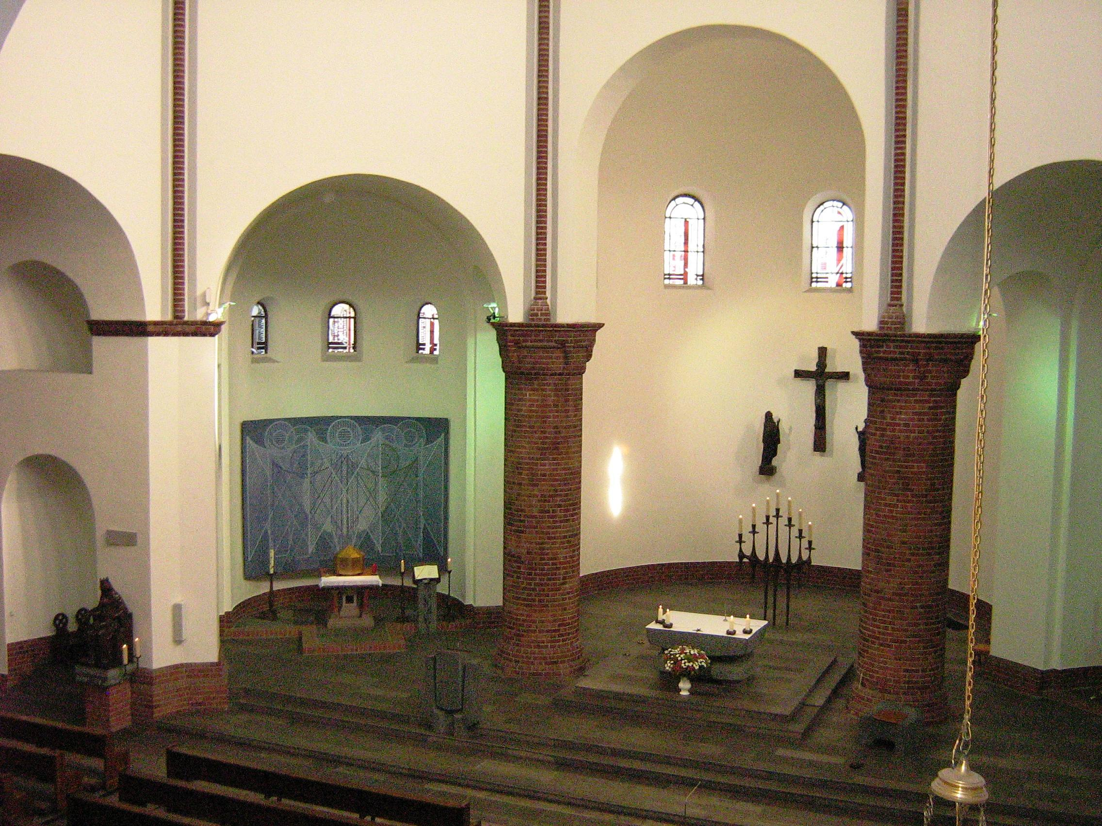 Römisch-katholische Kirche Maria, Hilfe der Christen Berlin-Spandau